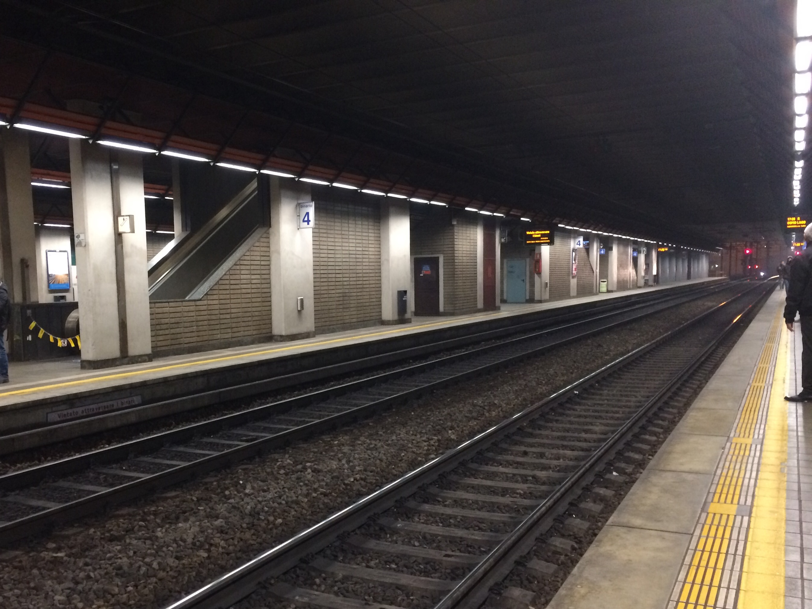 Stazione di Milano Bovisa Politecnico